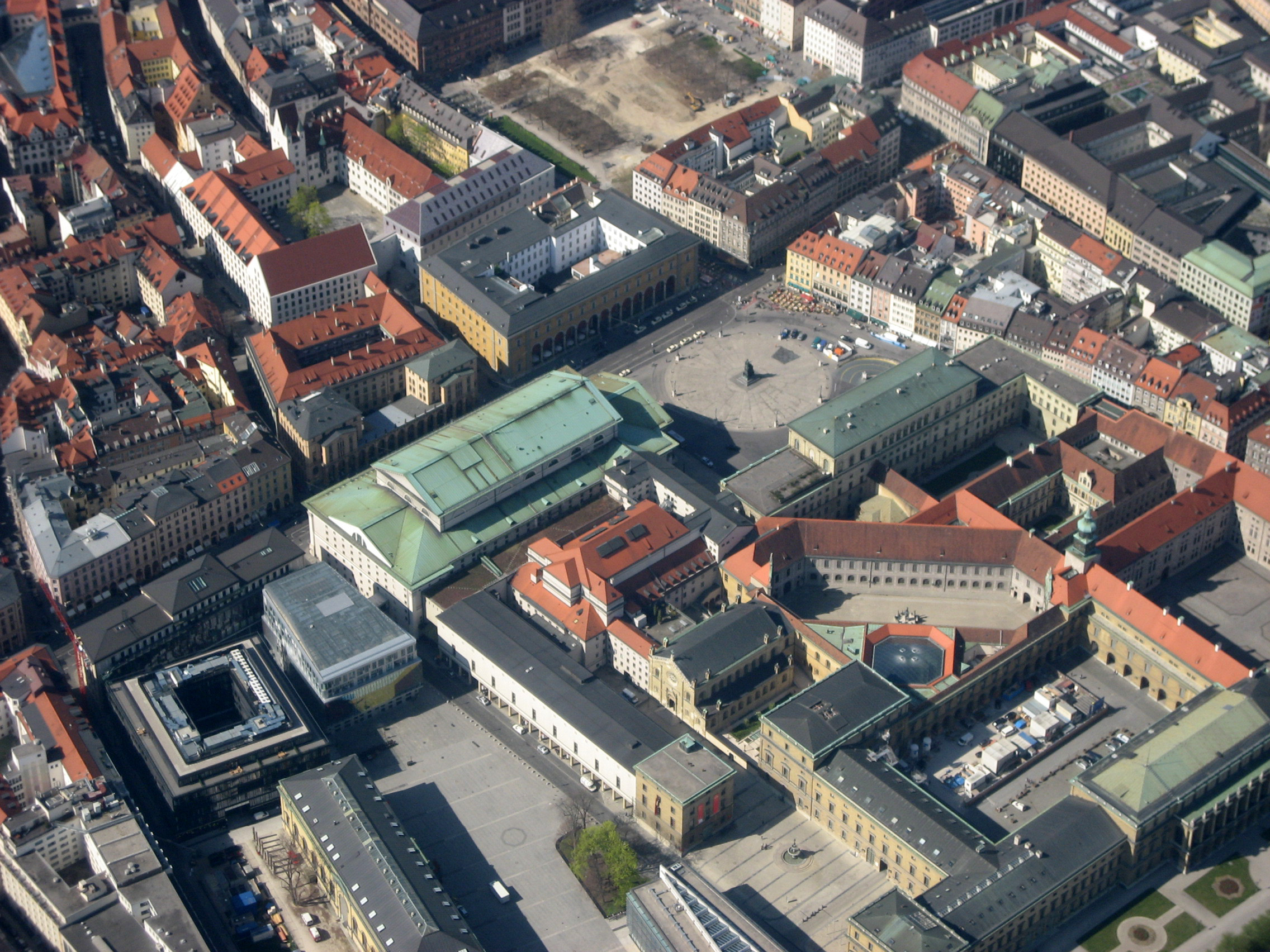 Luftbild der Münchner Innenstadt mit Max-Joseph-Platz, Nationaltheater, Marstall, dem südlichen Teil der Residenz und dem Marienhof